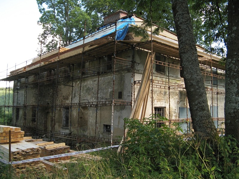 Zámek - Jánský zámeček Broumov, při silnici na Zadní Chodov 1, Broumov